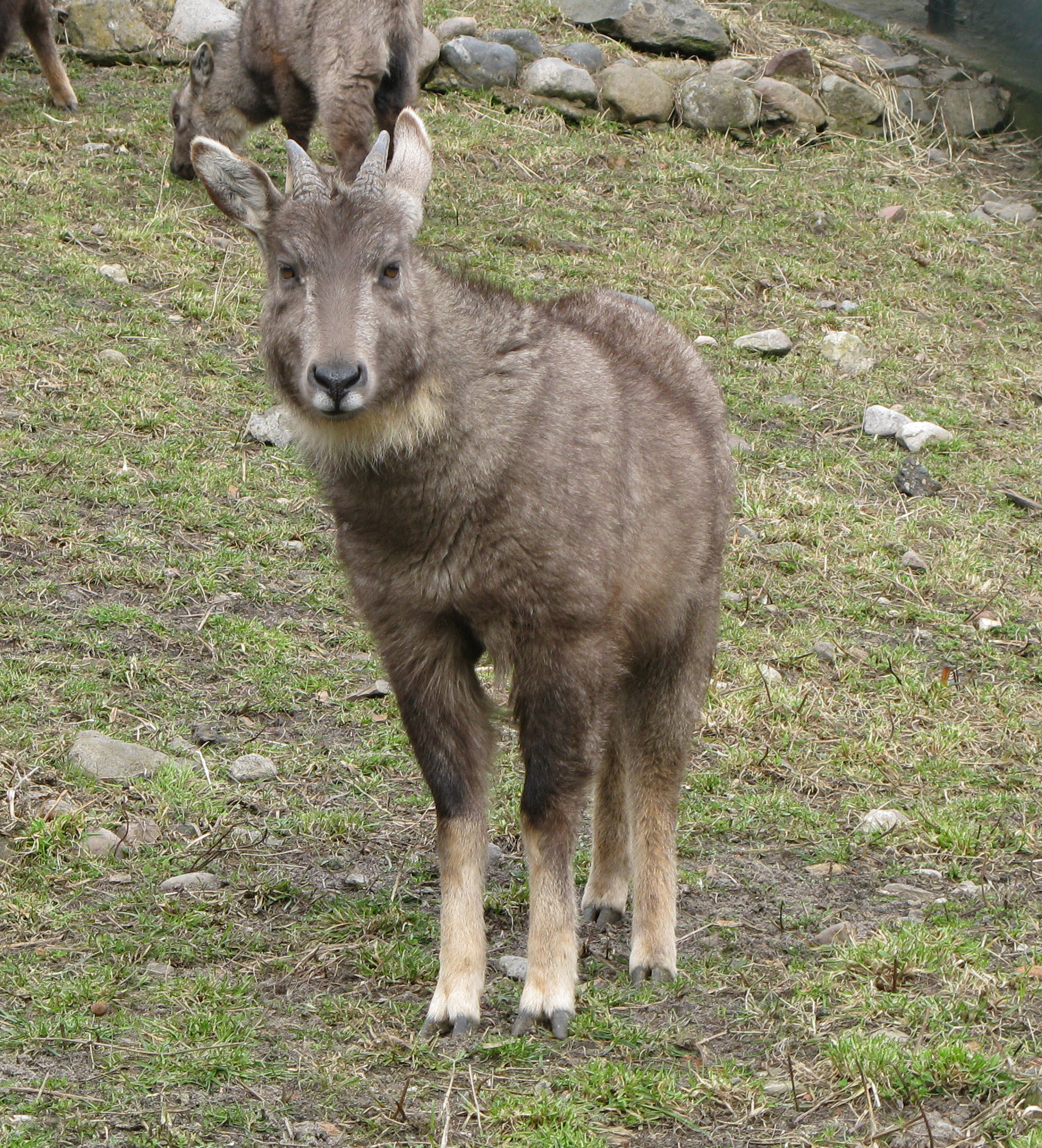 goral długoogoniasty w ogrodzie zoobotanicznym w Toruniu